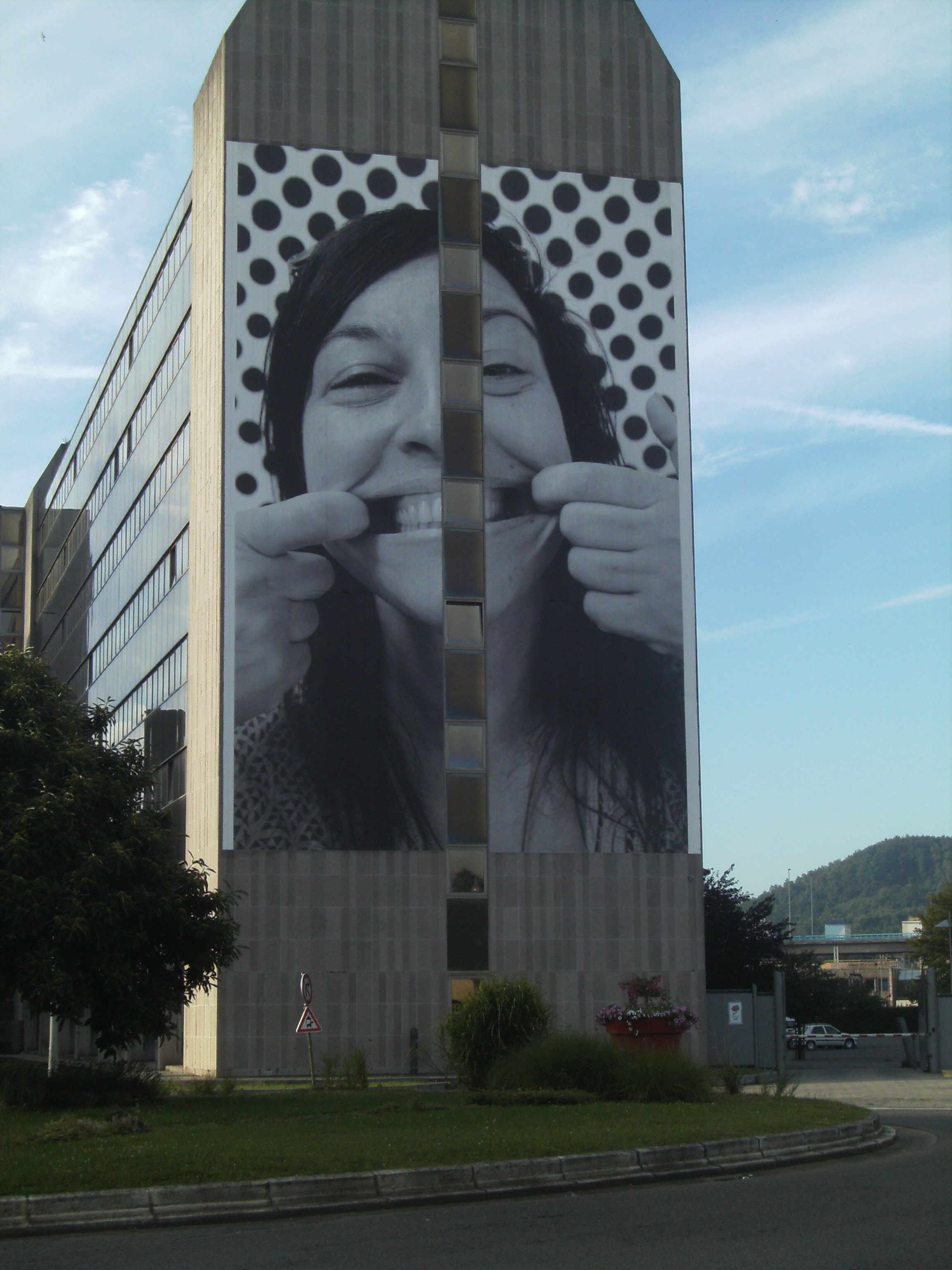 Photo apposée sur le bâtiment du ministère de finance à Charleroi dans le cadre de l'édition zéro de la biennale Asphalte initiée par le BPS22. Ce numéro zéro prend part au programme Inside Out conçu par l'artiste de rue JR avec comme scénario Smile!